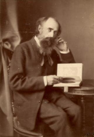 Портрет Маковского Николая Егоровича. Фотография.